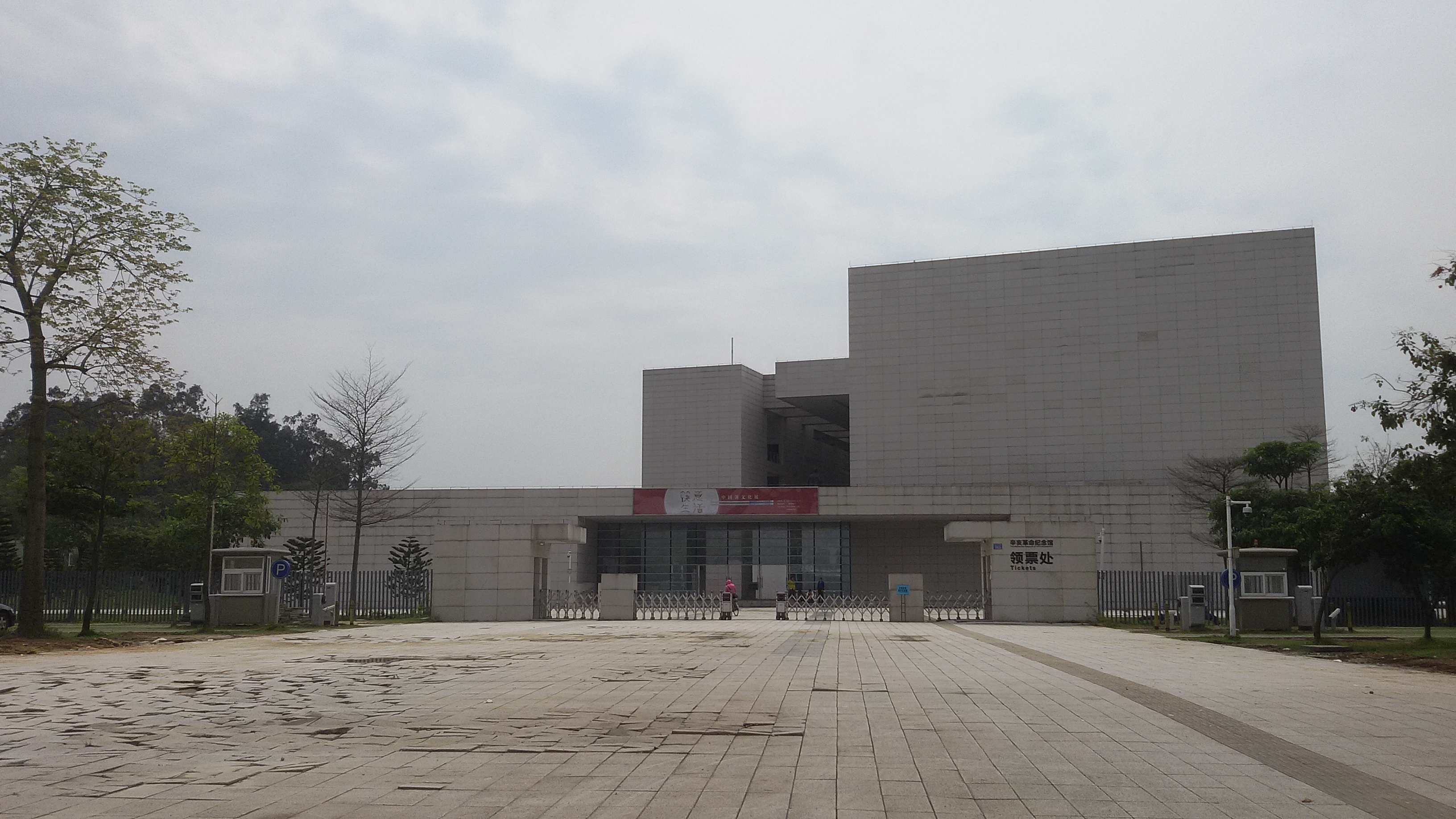 粵語: 廣州辛亥革命紀念館